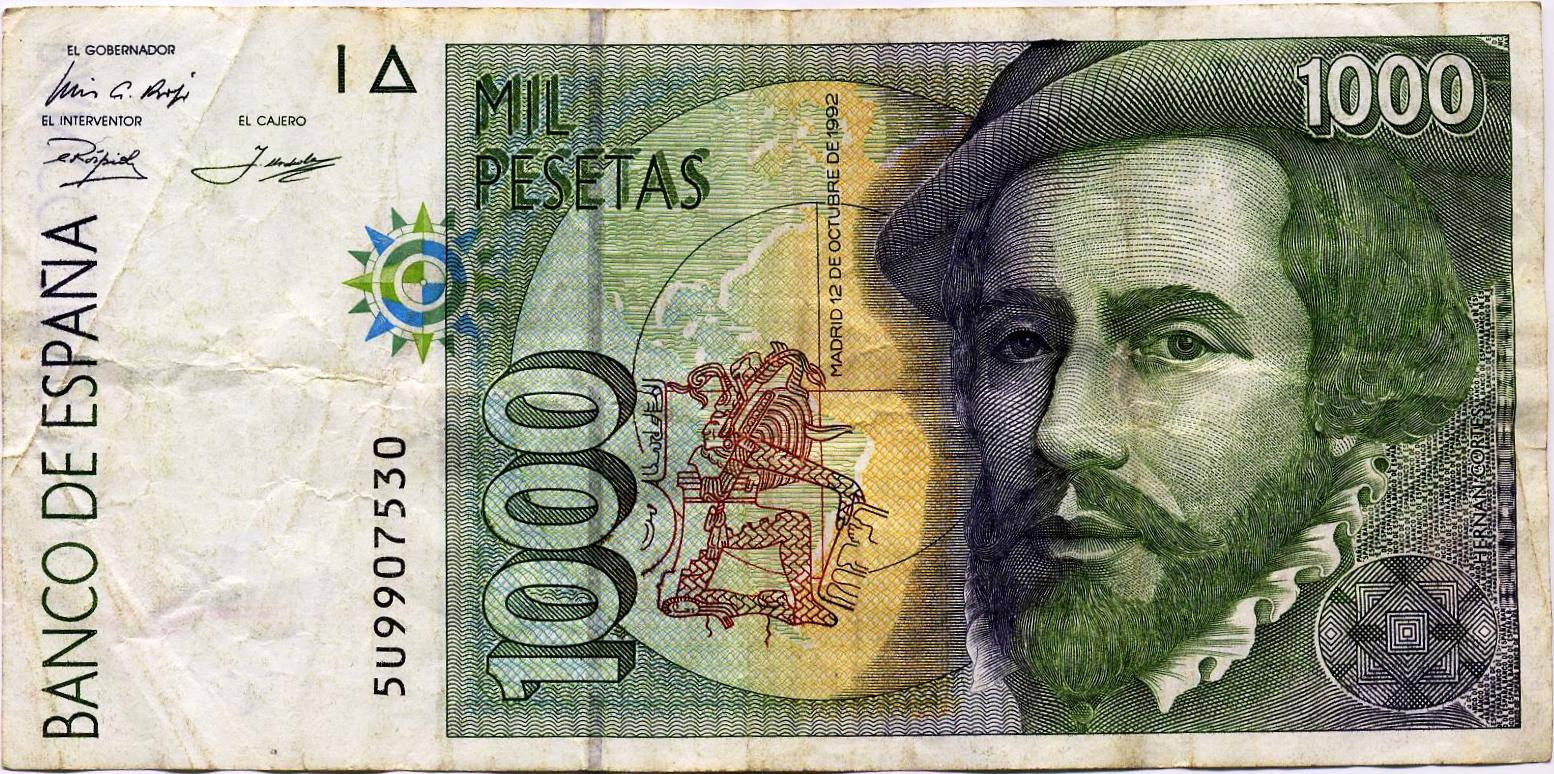 1000 pesetas, 12 de octubre de 1992, Hernán Cortés.